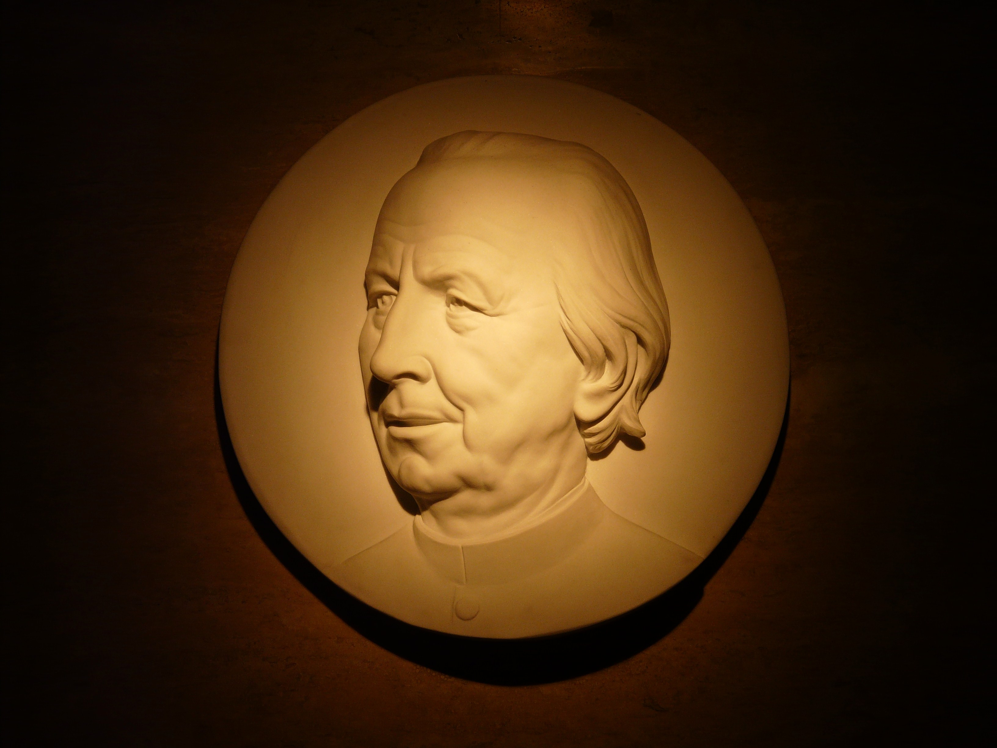 Effigie presso la tomba di padre Enrico Mauri nei sotterranei presso il santuario-tempio di Cristo Re, Sestri Levante, Liguria, Italia